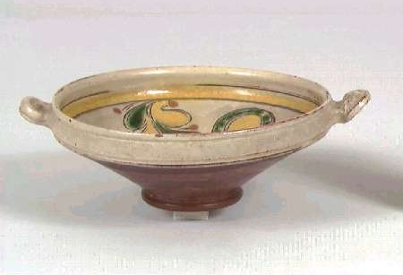 Øreskål datert 1863 i trønderkeramikk, innkommet fra Skaun i Sør-Trøndelag. Lengde 17,5 cm. Norsk Folkemuseum NF.1927-0285